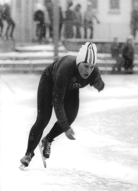 Karin Kessow ADN-ZB Mittelstädt 23.2.75 Assen-Niederlande: Neue Eisschnellauf-Weltmeisterin im Mehrkampf wurde am 23.2.75 in Assen die 21jährige Karin Kessow (DDR) vor Tatjana Awerina (UdSSR) und der Sprint-Weltmeisterin Sheila Young (USA). Unser Foto stammt von einem früheren Wettkampf. Abgebildete Personen: Kessow, Karin: Eisschnelläuferin, DDR